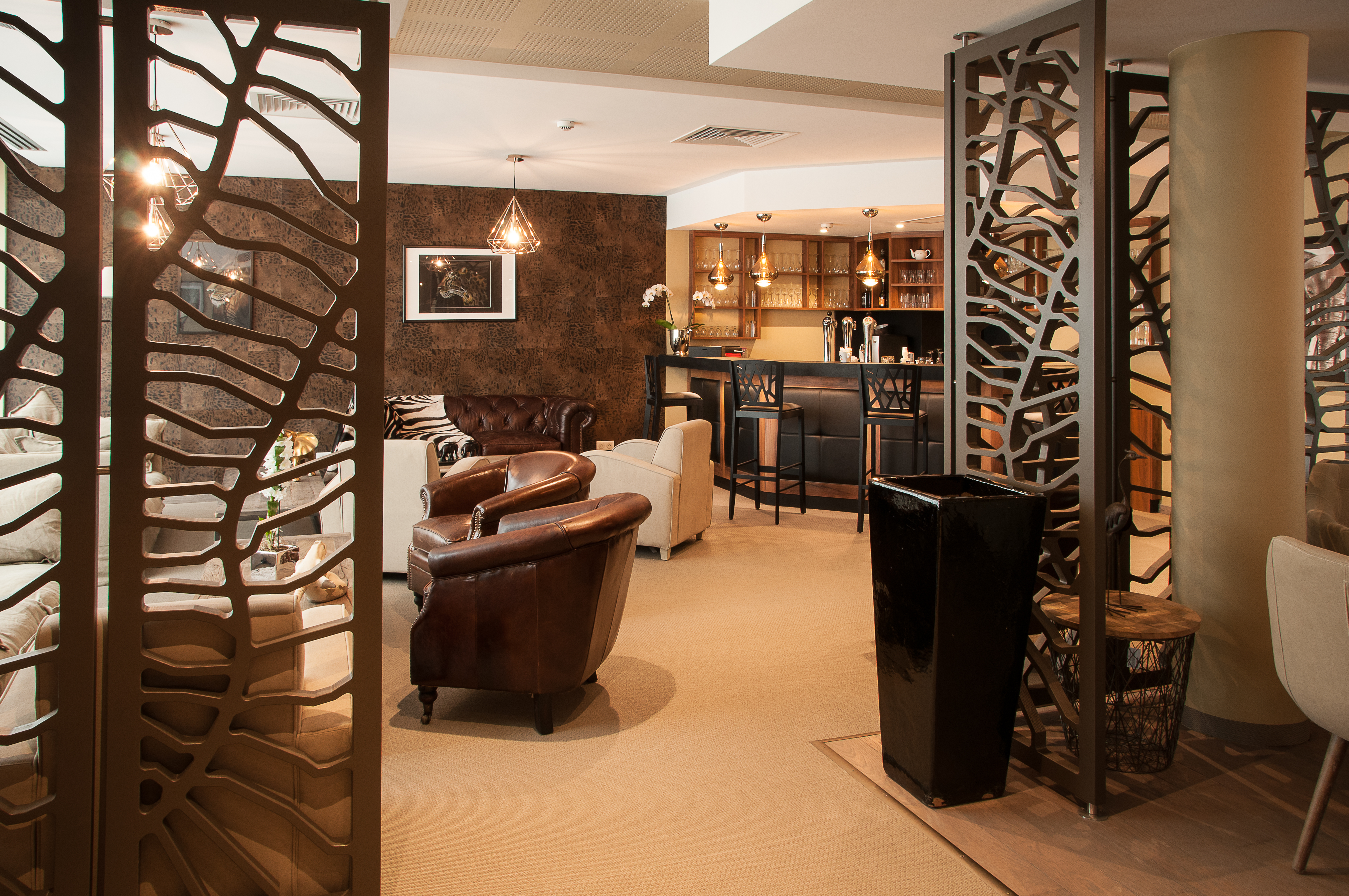 Facade de l'Hôtel Le Branhoc Brit Hotel